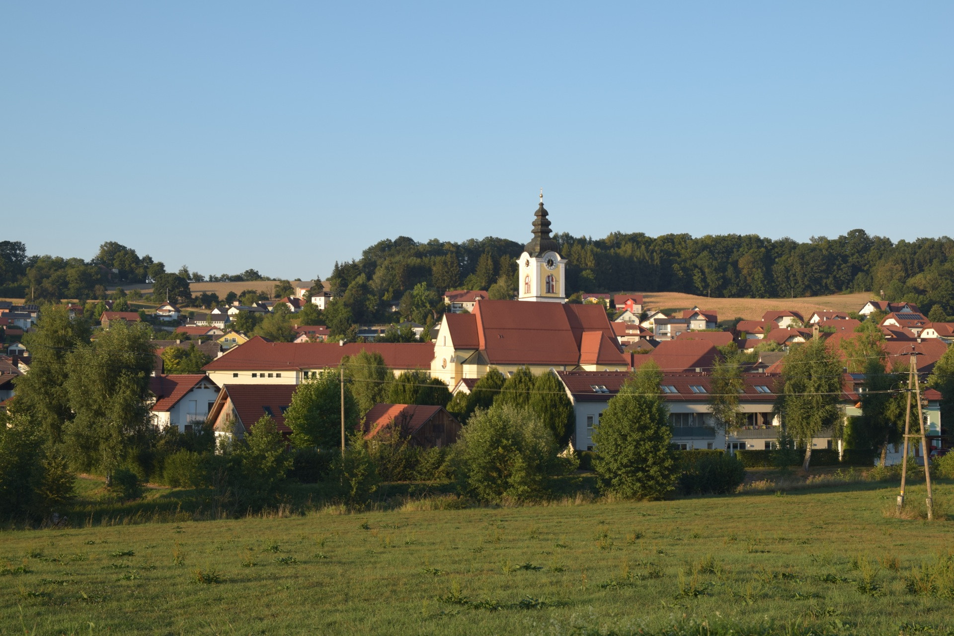 Kath. Pfarrkirche zur Himmelfahrt Mariä